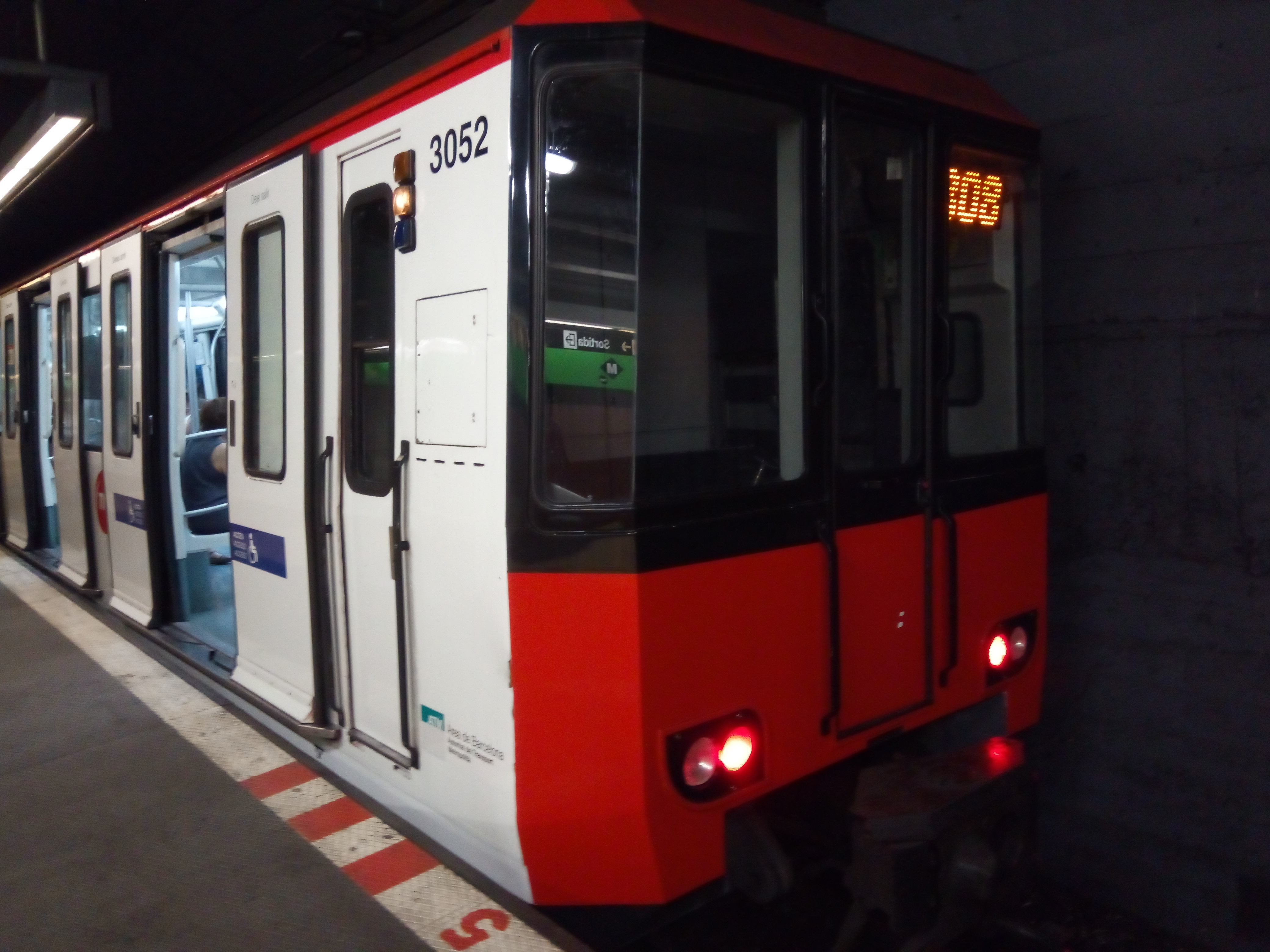 Unidad de la serie 3000 fabricado por caf En La estacion caberzera de Trinitat Nova.